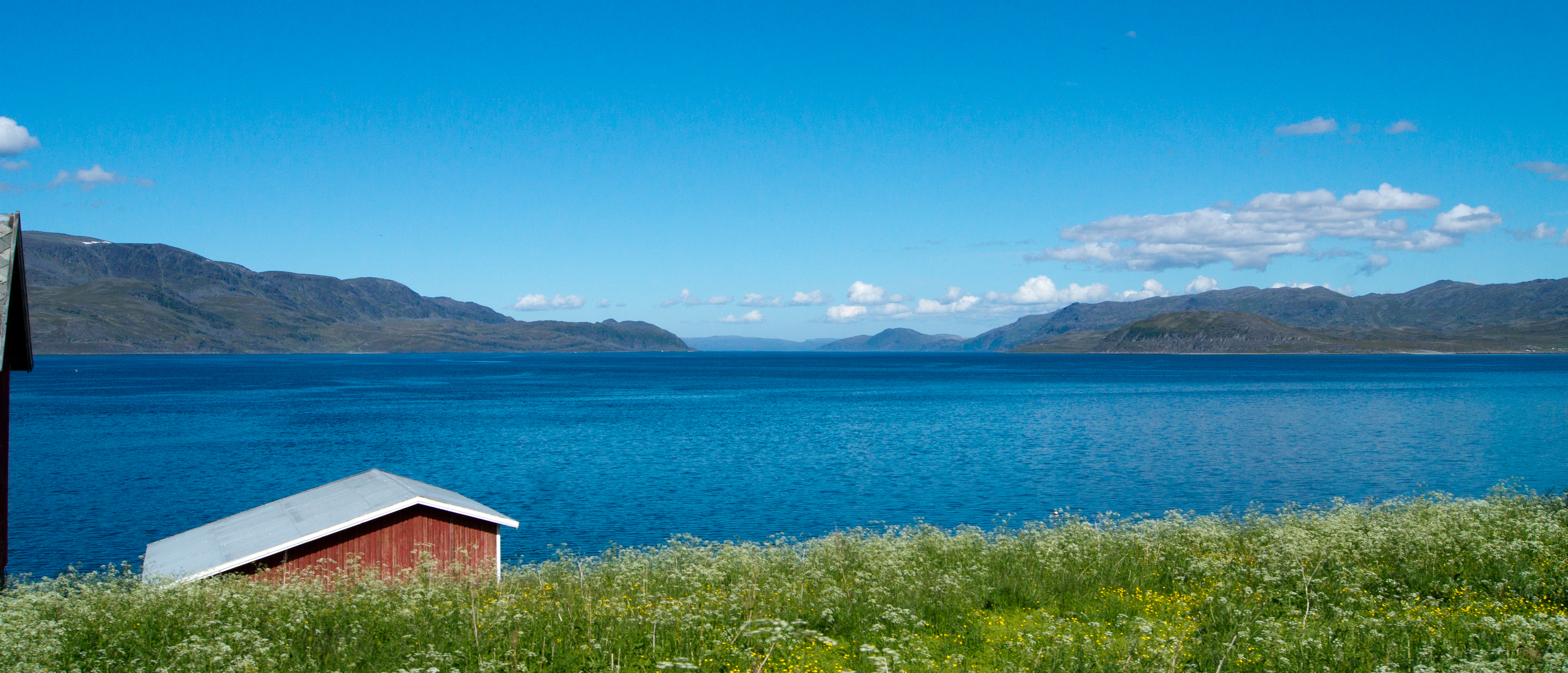 Sammelsundet